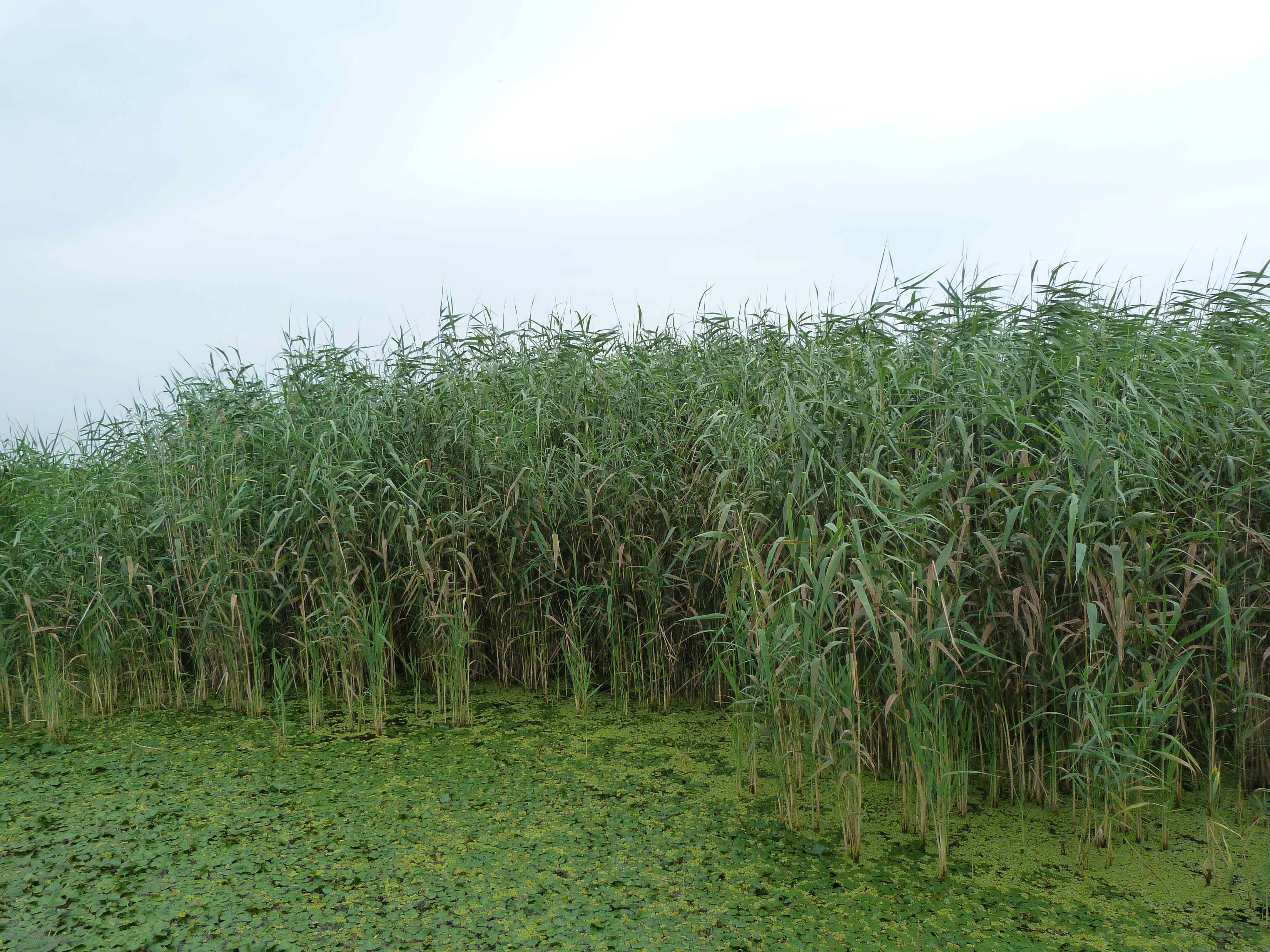 A felvétel 2012. július 25 én készült Poroszlón, a Tisza-tavi vizi sétányon. Nád. Megjelent Creative Commons alatt a Metapolisz DVD sorozatban. Forrás: 3388 Poroszló, Nyugati Fogadó